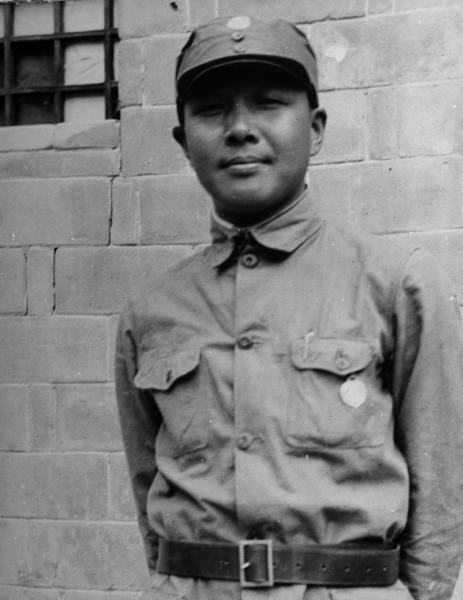 抗日战争时期的赵尔陆将军